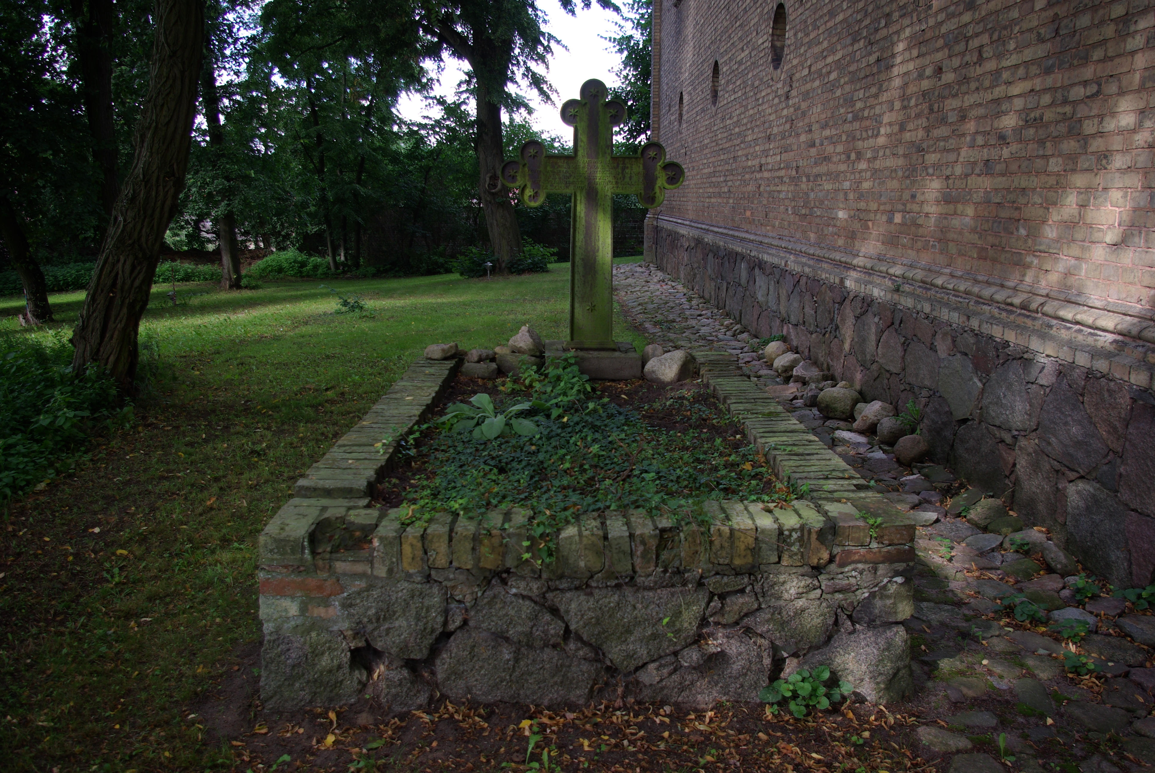 Bad Freienwalde in Brandenburg. Das Grab voe Ernst Ludwig Zimmermann an der Kirche in Altglietzen steht unter Denkmalschutz.